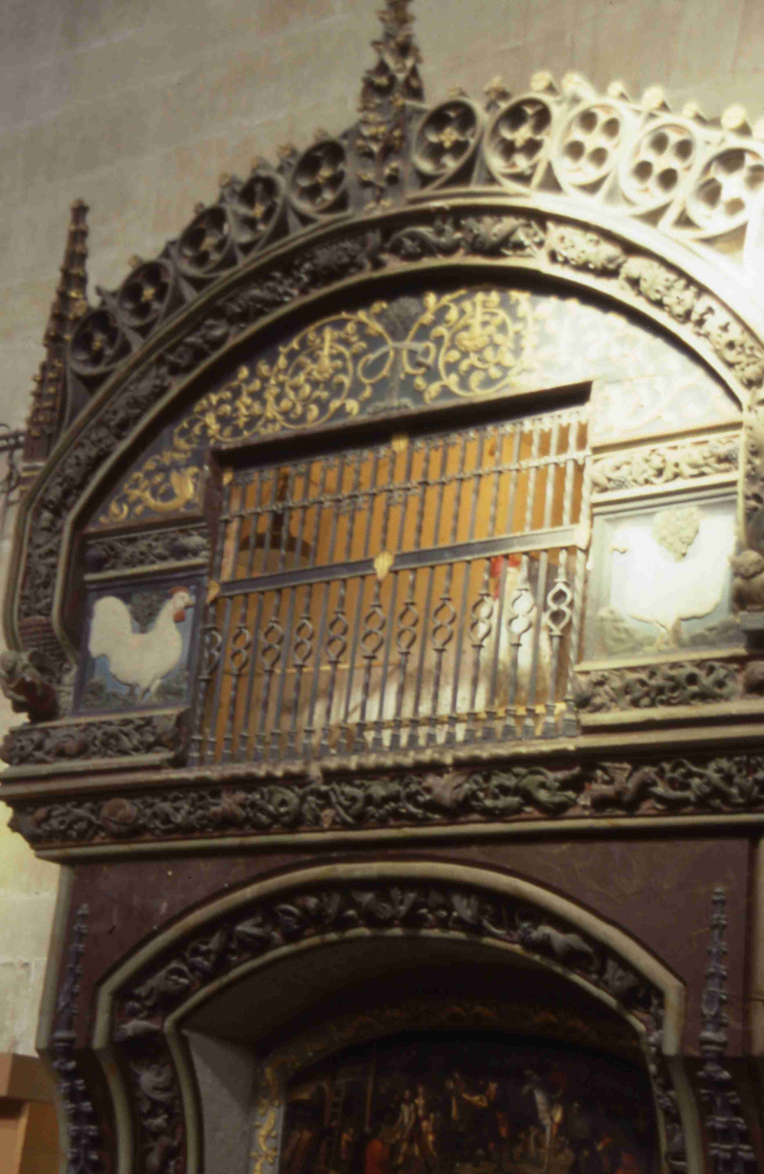 Hühner in der Kirche von Santo Domingo De La Calzada